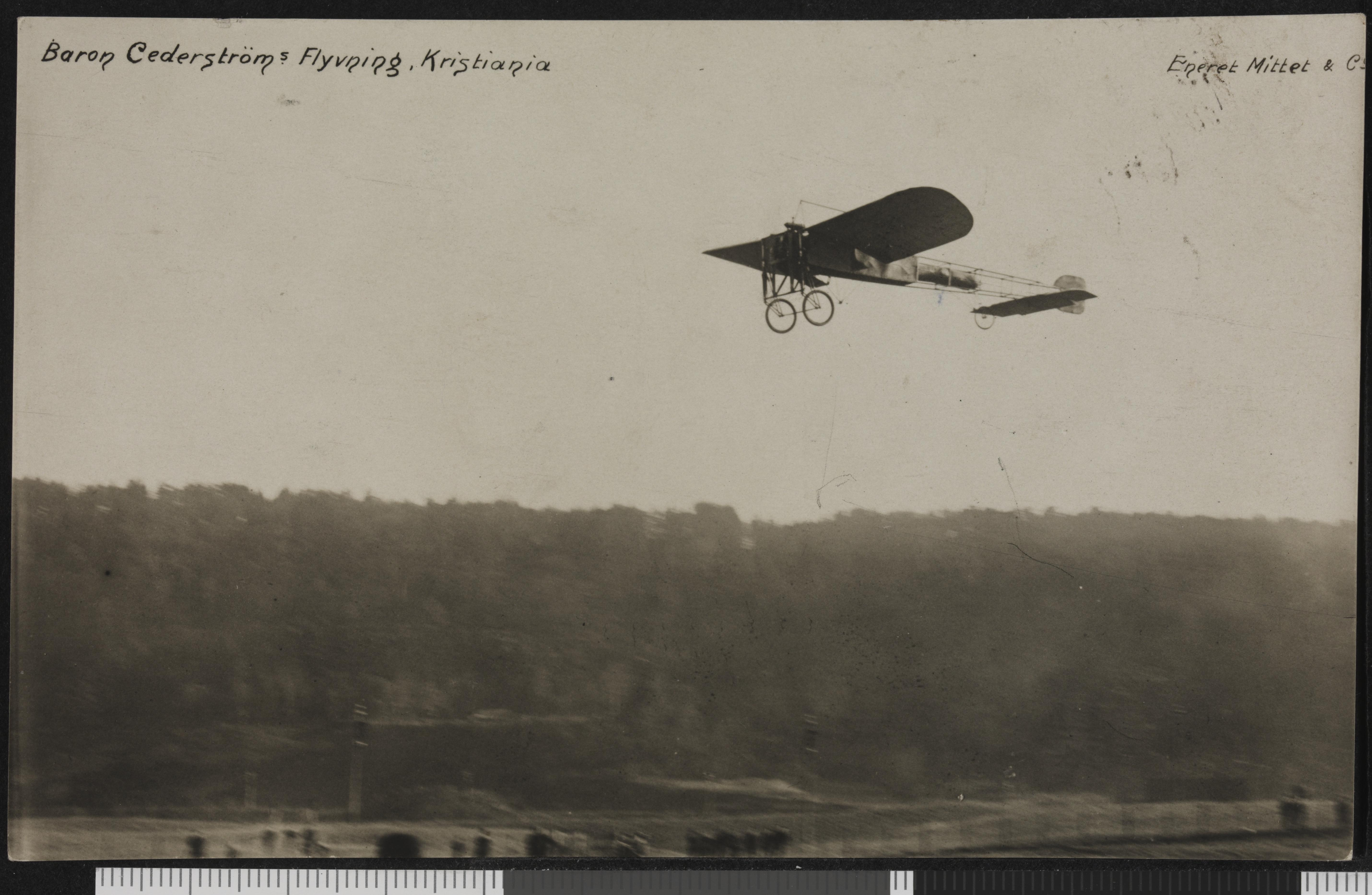 Bildet er hentet fra Nasjonalbibliotekets bildesamling Etterstadsletta, Oslo, Oslo Den første flyturen i Norge ble foretatt av den svenske baronen Carl Cederström 14. oktober 1910 da han fra Etterstadsletta i Oslo fløy rundt Hovedøya, og landet etter 23 minutter under stor jubel fra omkring 30 000 tilskuere. Depicted person: Cederström, Carl Gustav